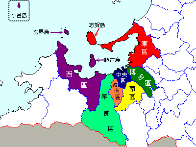 日本福岡縣福岡市區分圖。